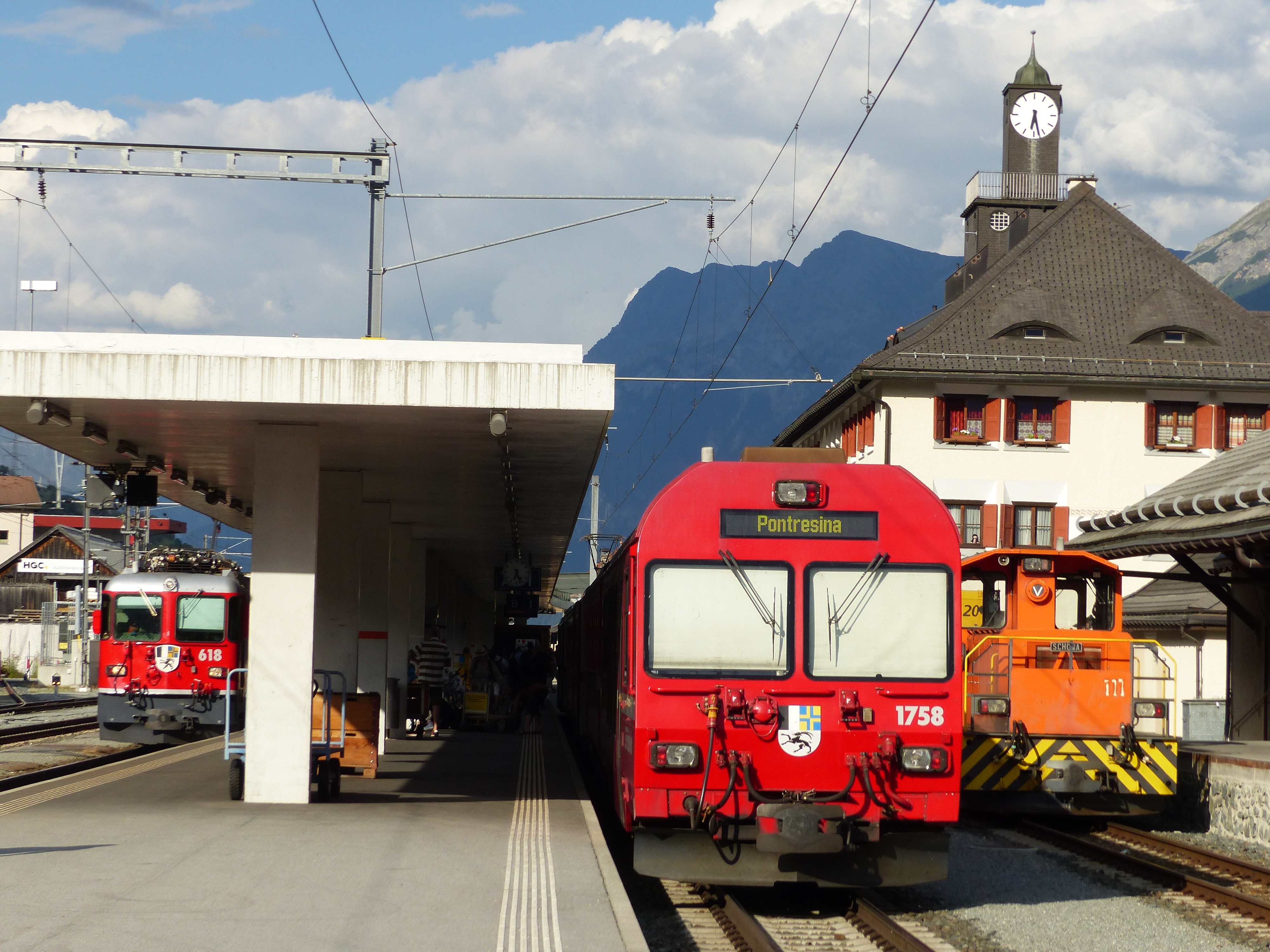 Bahnhof Scuol-Tarasp: Zwei abfahrbereite Züge